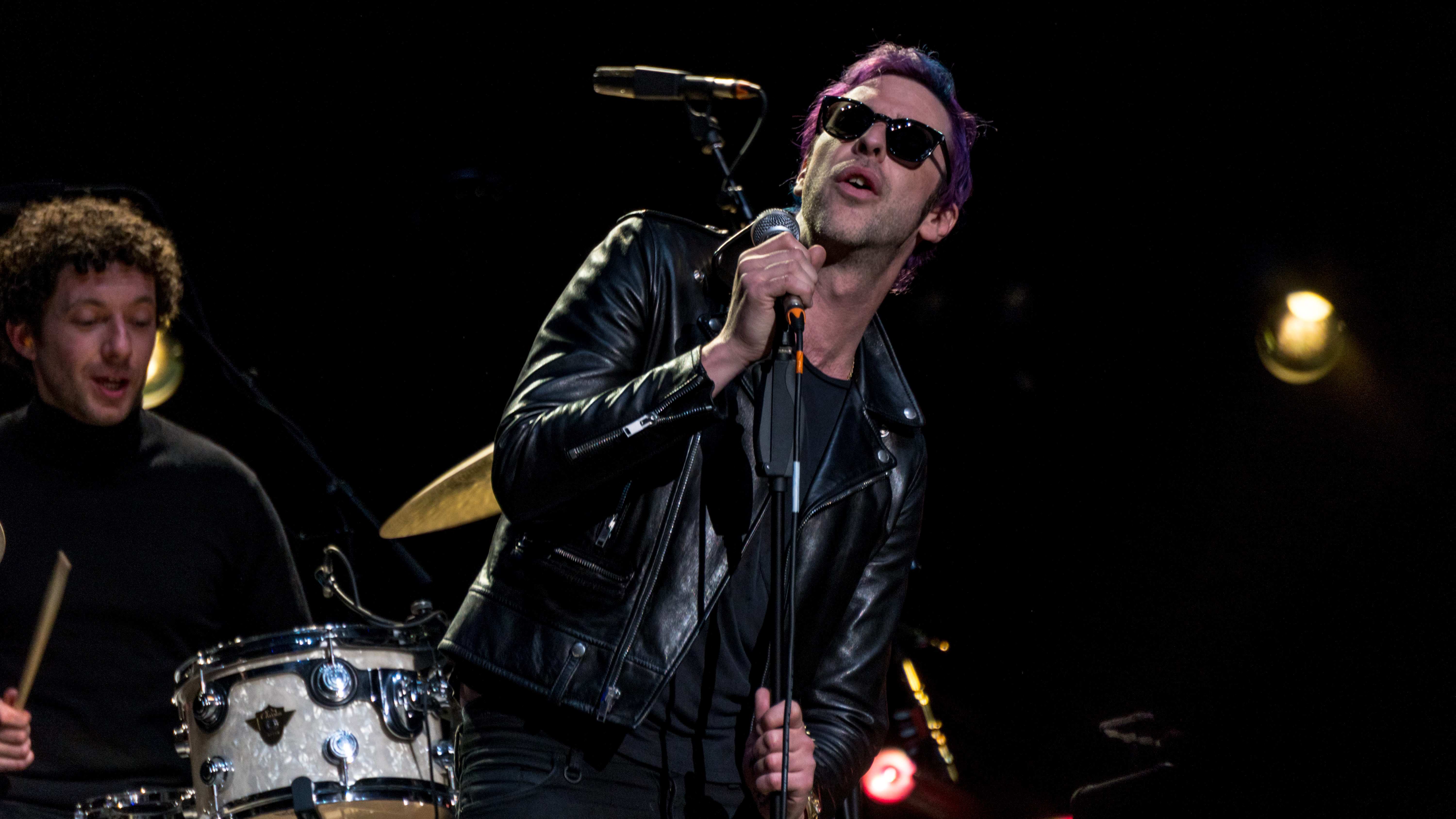 RogDaltreyRAH220318-12